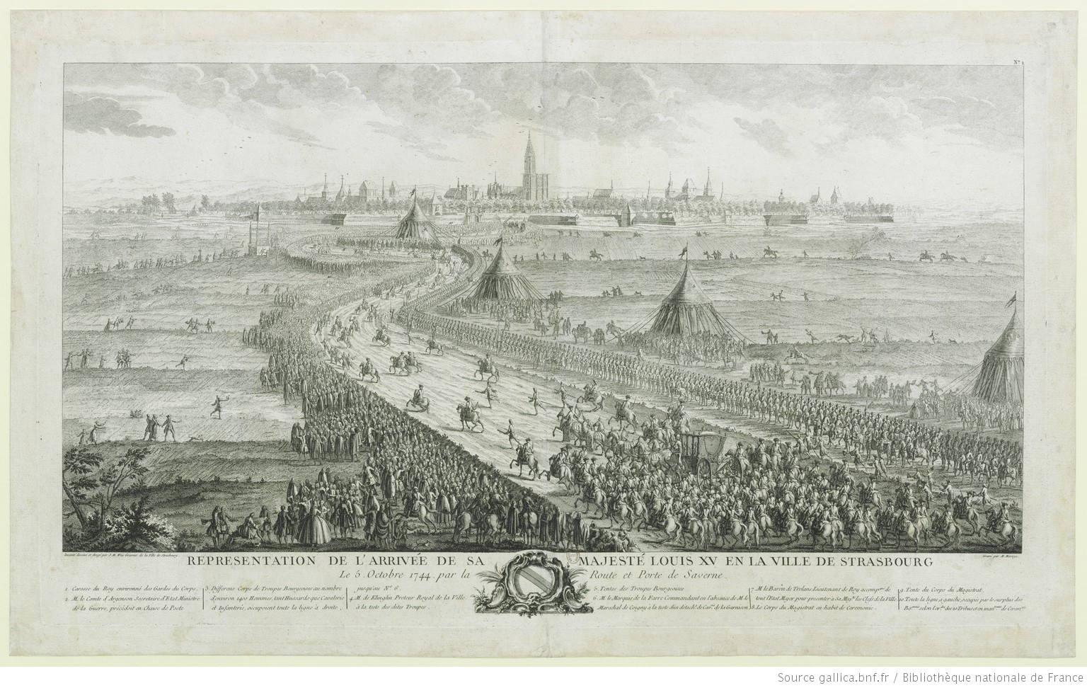 gravure